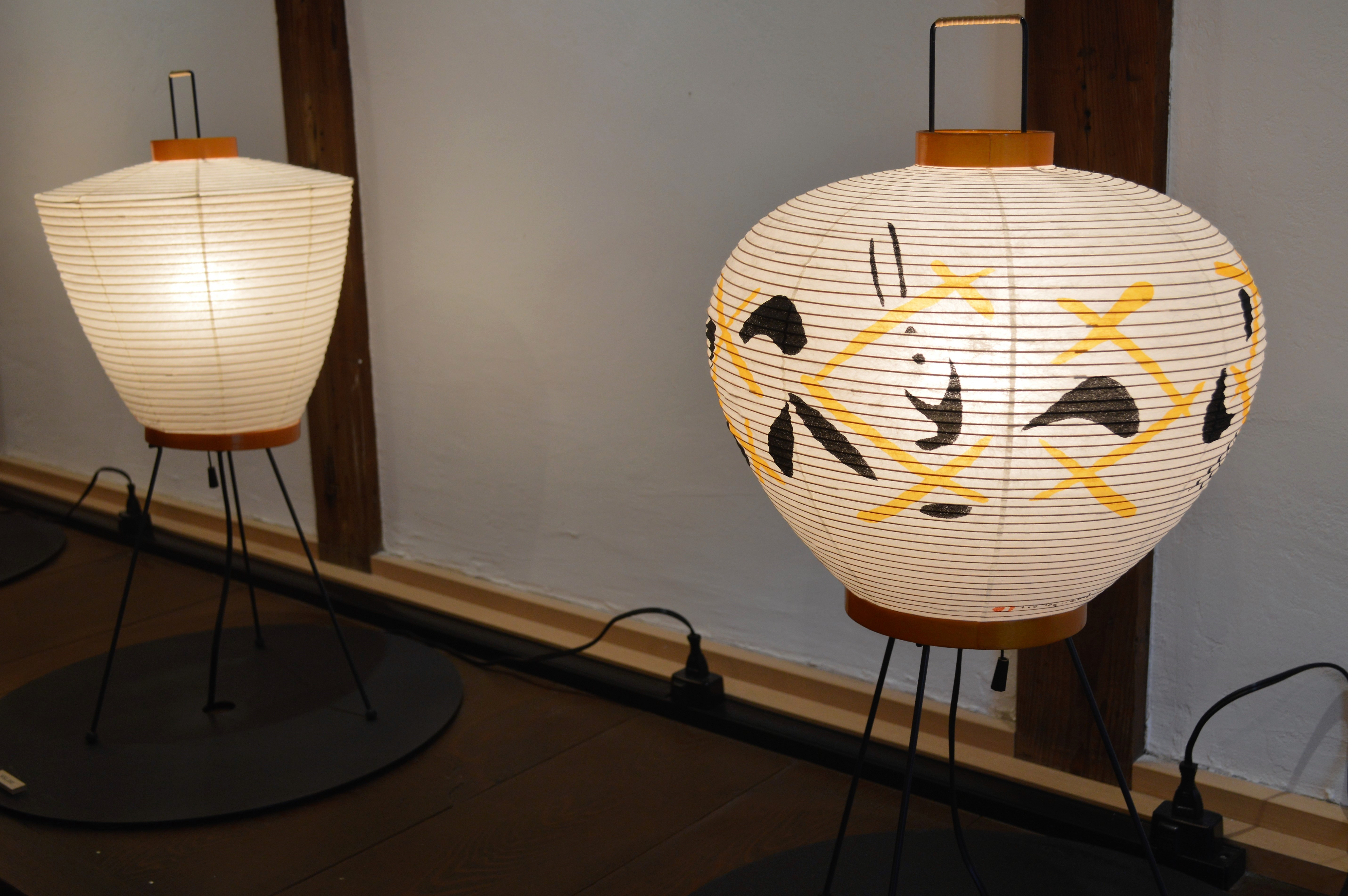 岐阜提灯。岐阜県岐阜市の長良川てしごと町家CASAにて。